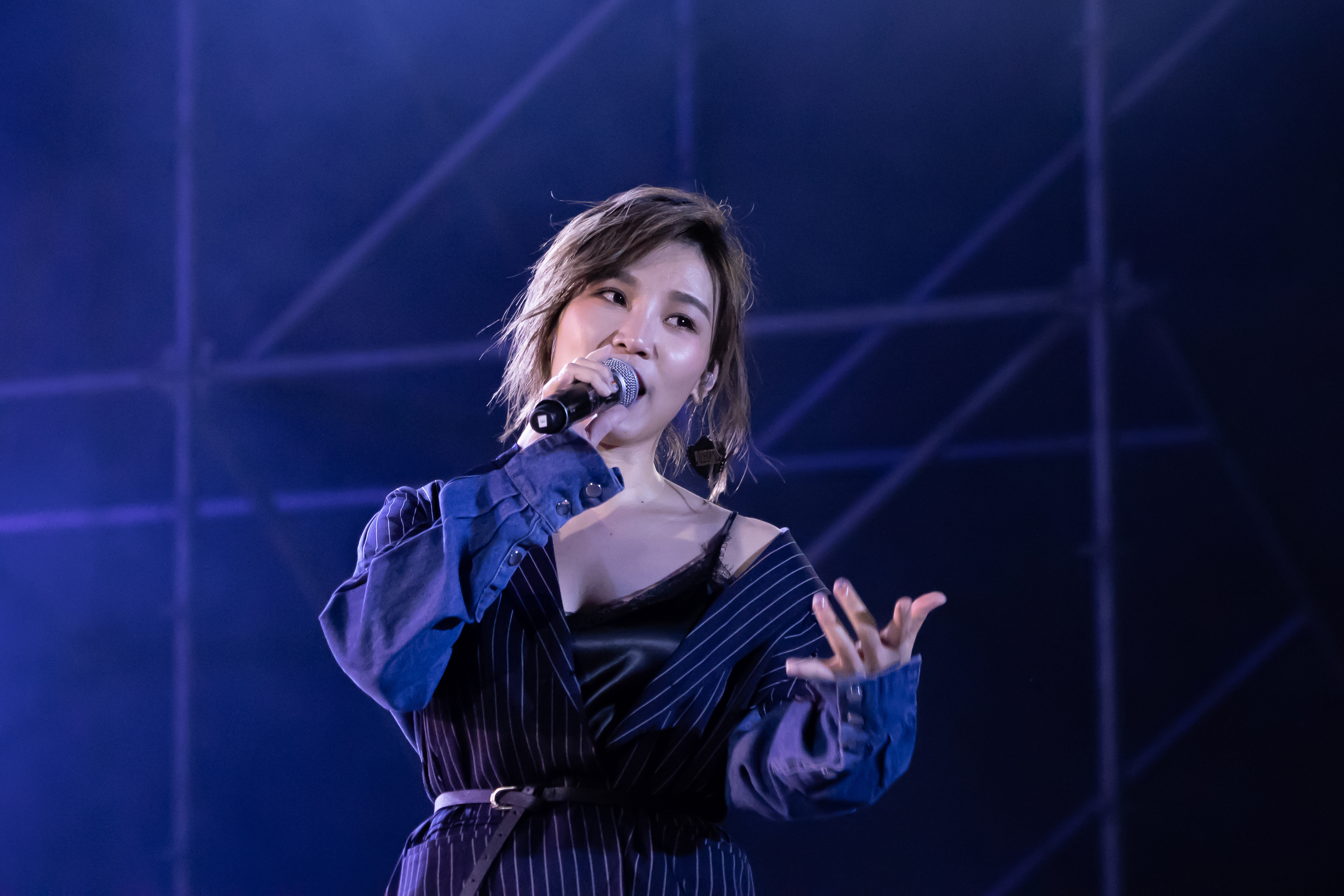 中文（台灣）: 20190714 台灣 宜蘭頭城鄉烏石港 李佳薇 音浪頭城